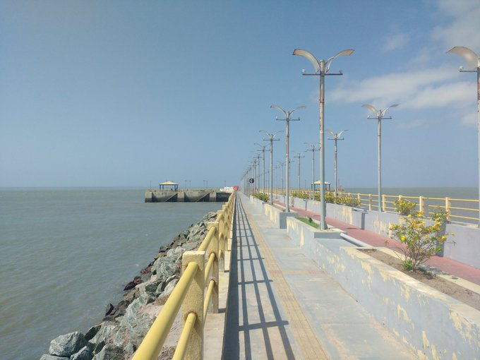 Cais de São José de Ribamar